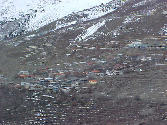 पुह् का दूरस्थ दृश्य